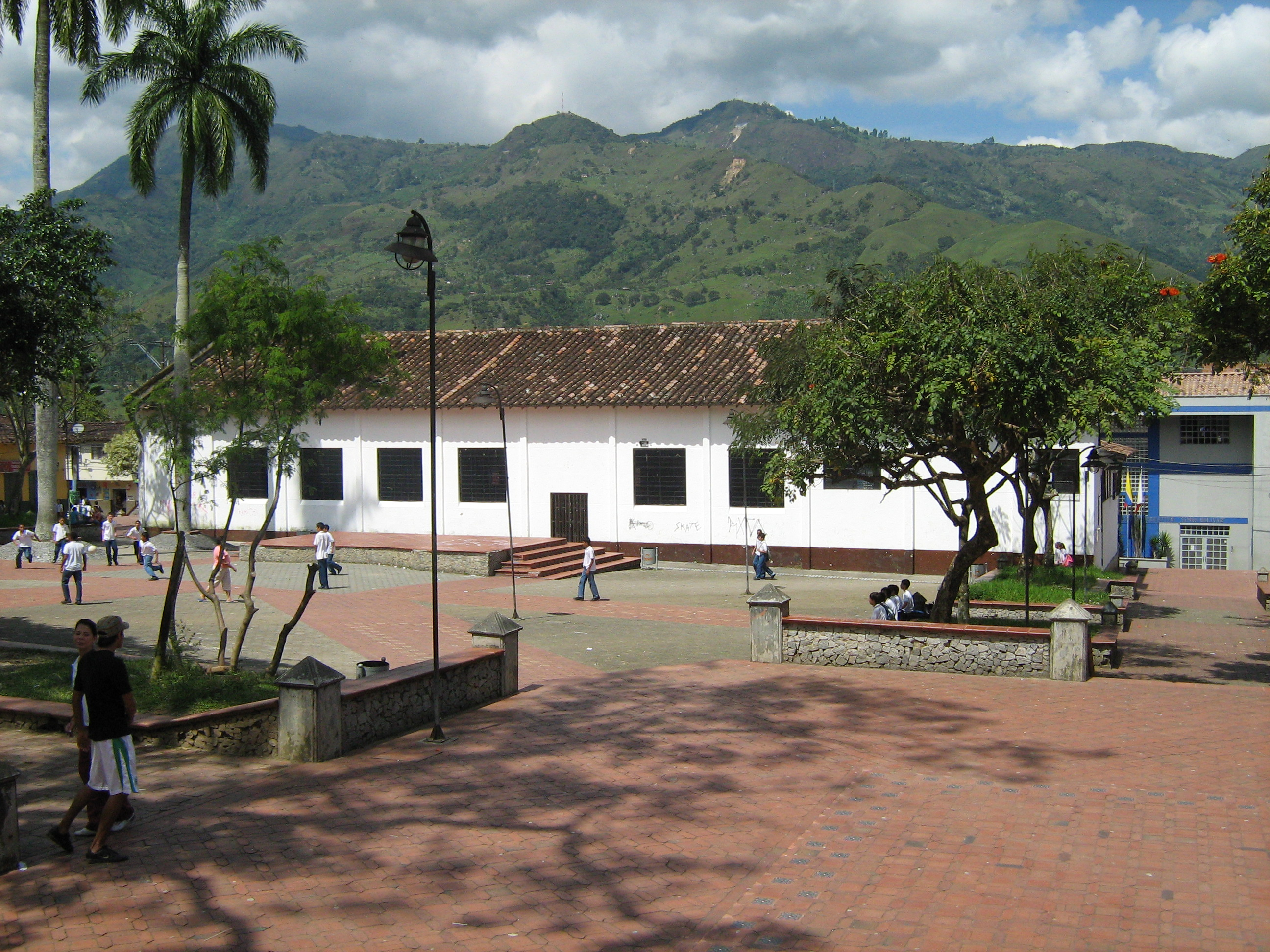 Parque Diego Echavarría Misas, al fondo Biblioteca Pública Isolda Echavarría en el municipio de Barbosa, Antioquia, Colombia.